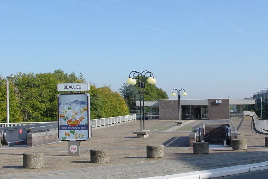 Metro de Bruxelles Belgium station Beaulieu